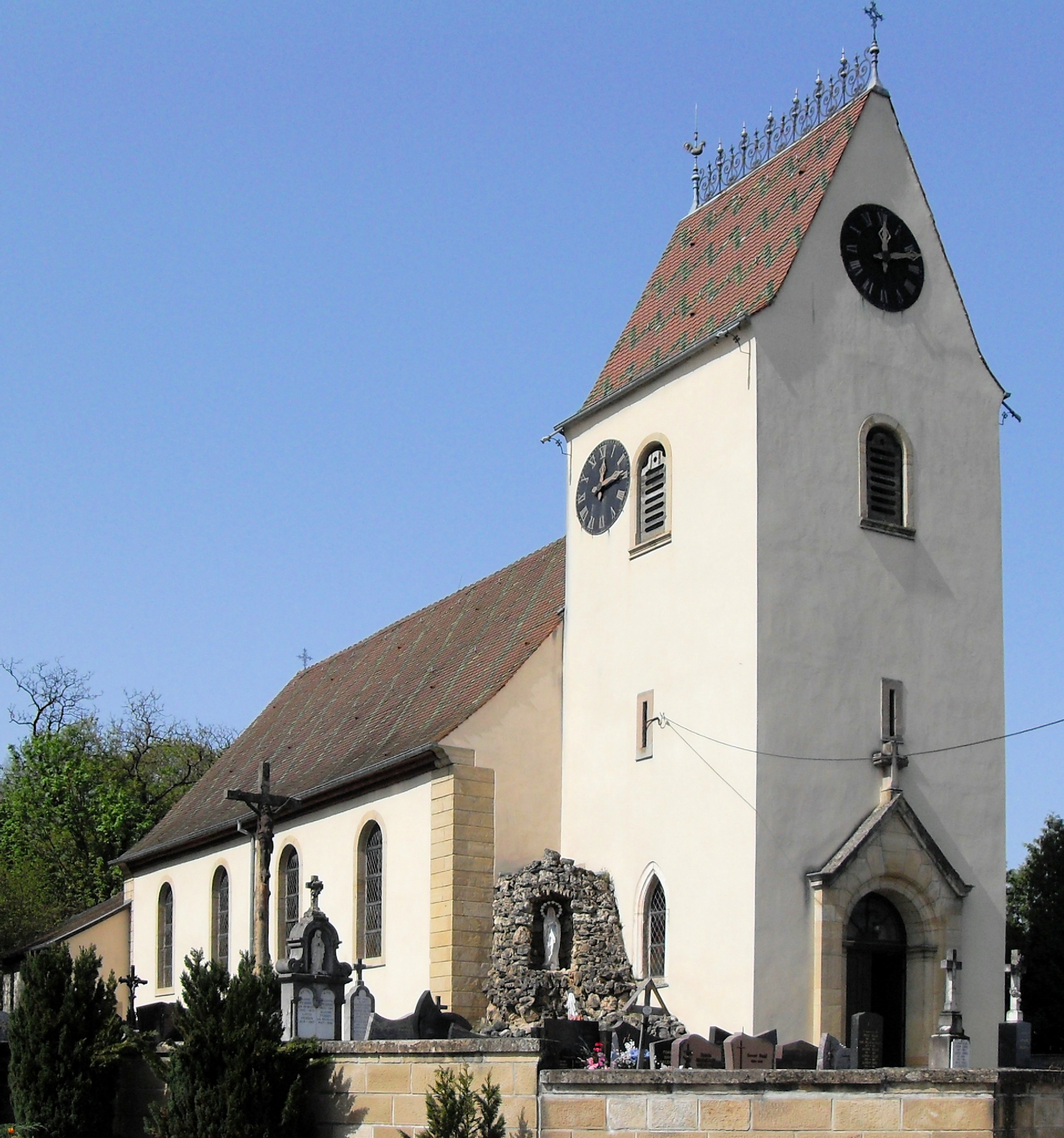 L'église Saint-Pierre et Saint-Paul à Heidwiller